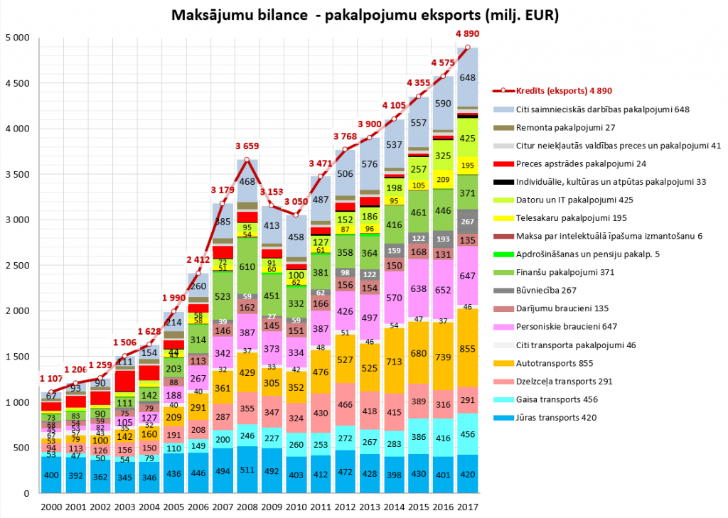 Pakalpojumu eksporta dinamika, CSP